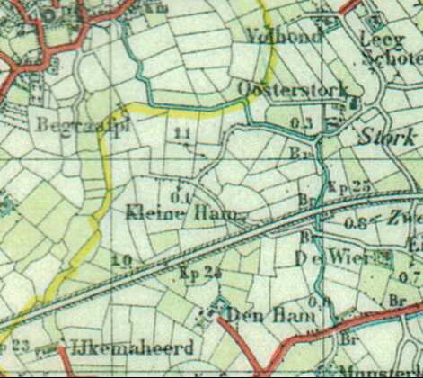 Westeremdermaar op de topografische kaart 7 Oost 1:50.000 van 1934